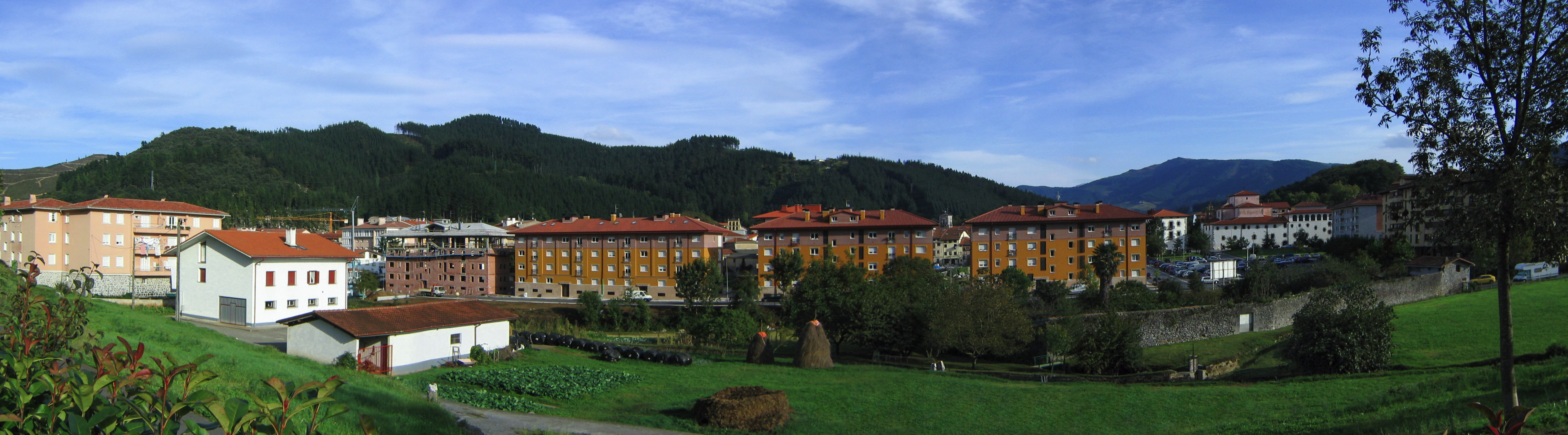 Vista general de Markina, Bizkaia, País Vasco, España.